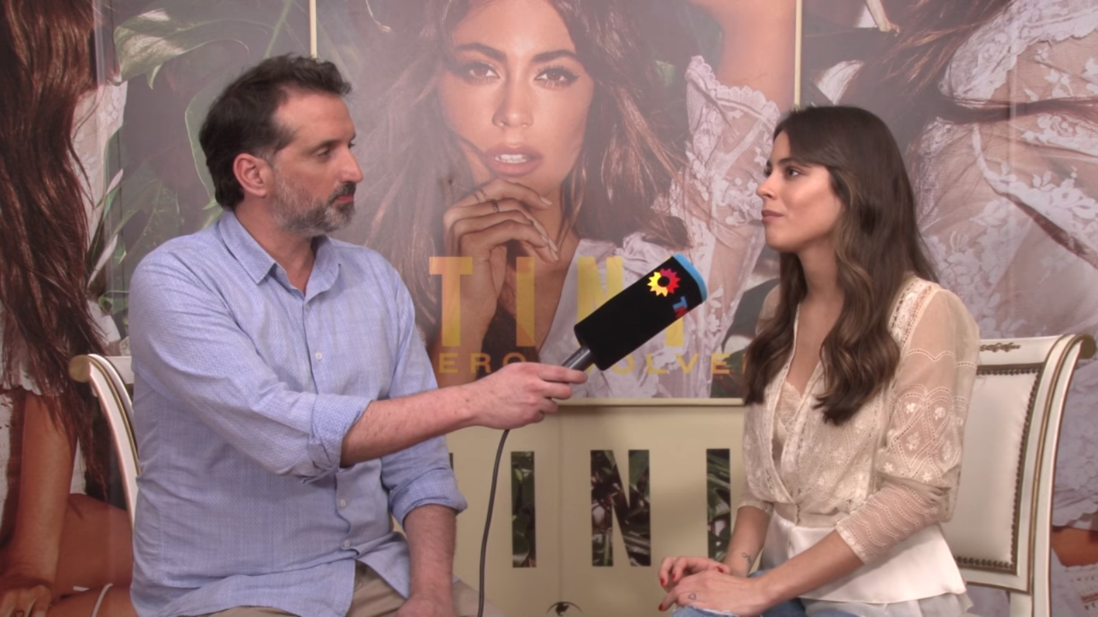 Tini Stoessel en entrevista con Todo Noticias en 2018